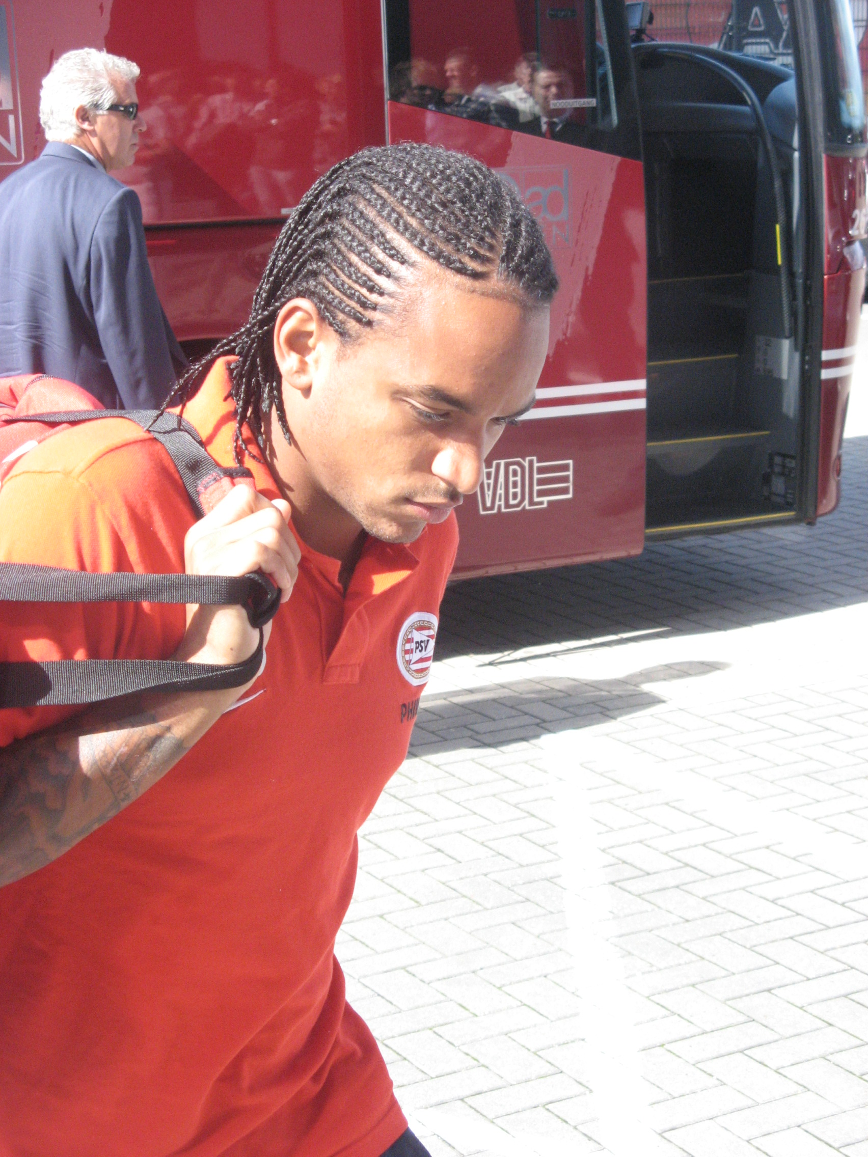 Funso Ojo (Antwerpen, 28 augustus 1991) is een Belgisch betaald voetballer die bij voorkeur op het middenveld speelt.